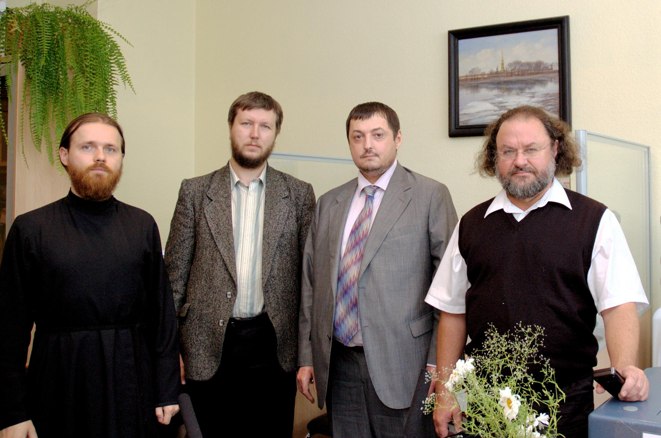 6 августа 2008 года на радио «Радонеж» прошел круглый стол, посвященный православному интернету. Справа на лево: Евгений Никифоров, Александр Дятлов ( Иван Мазуренко (